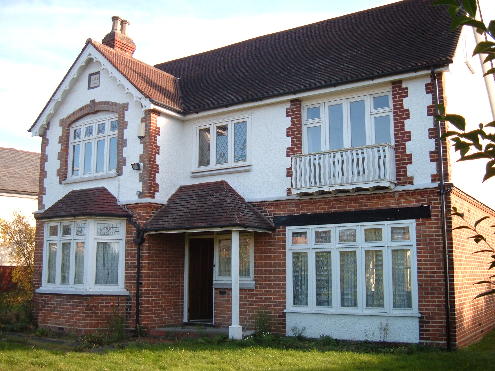 Front elevation